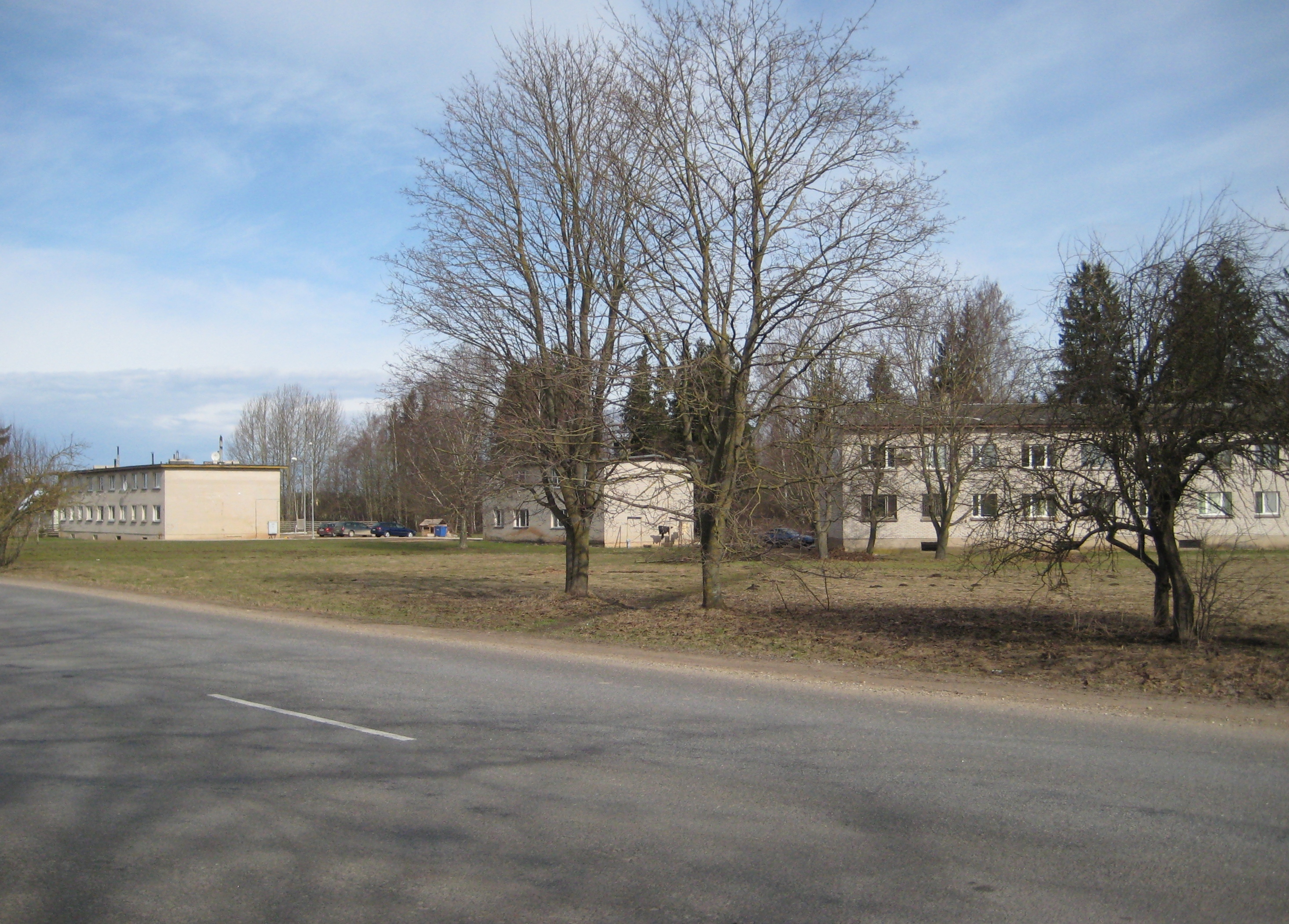 Rahinge kortermajad